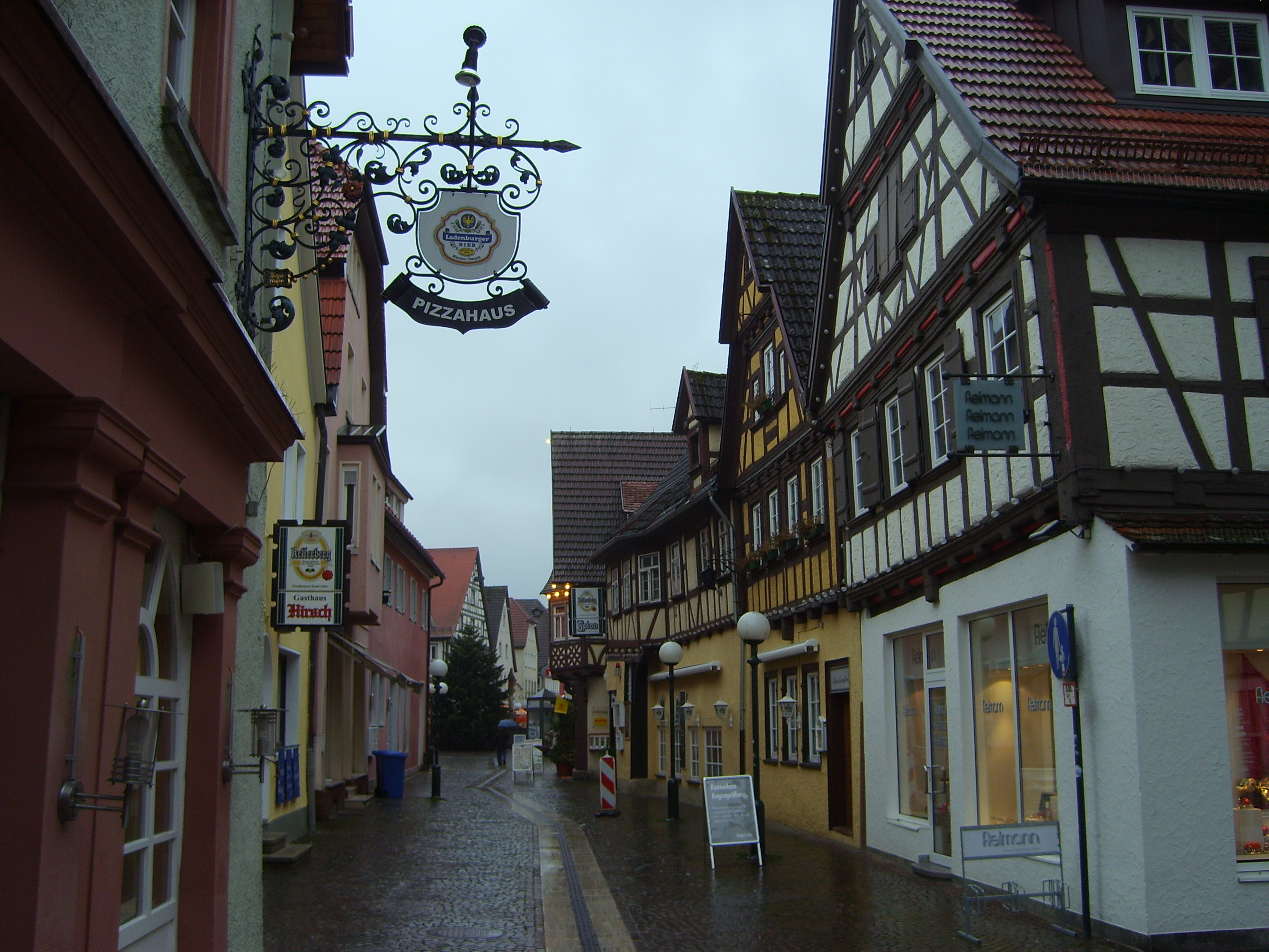 Historische Häuser in der Radgasse in Aalen, Blick Richtung Süden